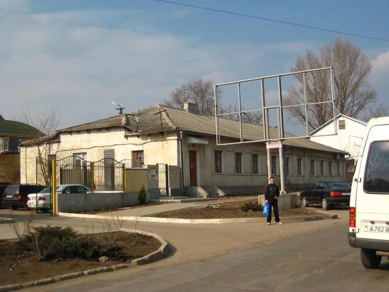 Бывшая баня Балабана